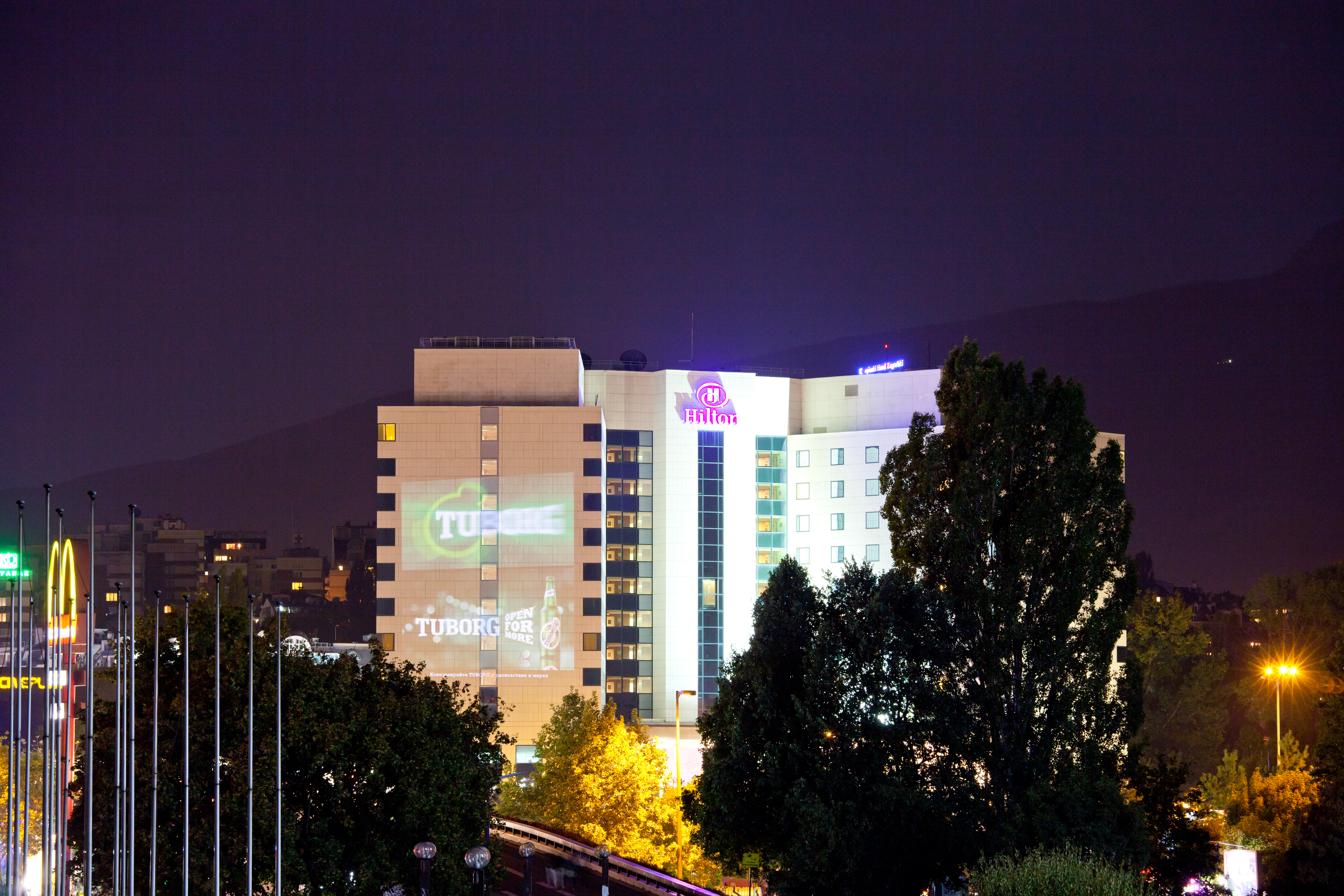 Sofia , Hotel Hilton (hinter dem Kulturpalast))